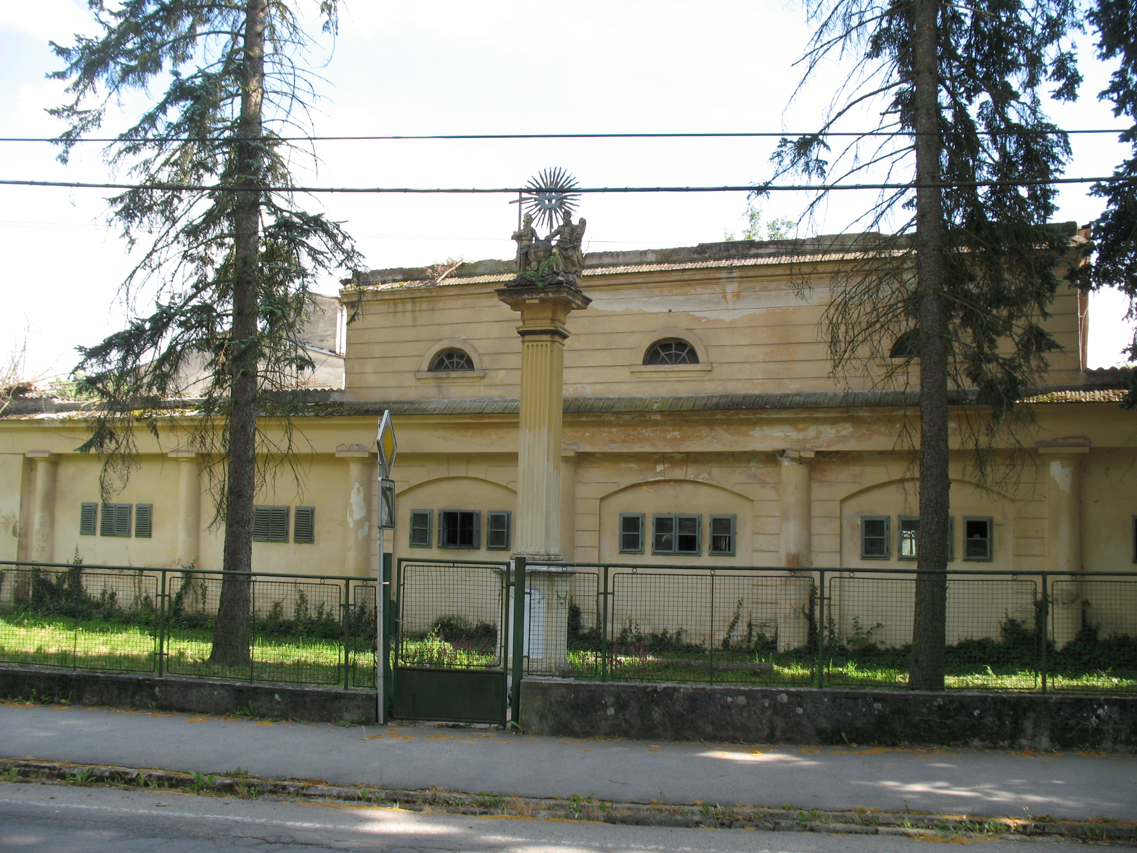 Motesic Szentháromság oszlopSlovenčina: Trojičný stĺp, Motešice